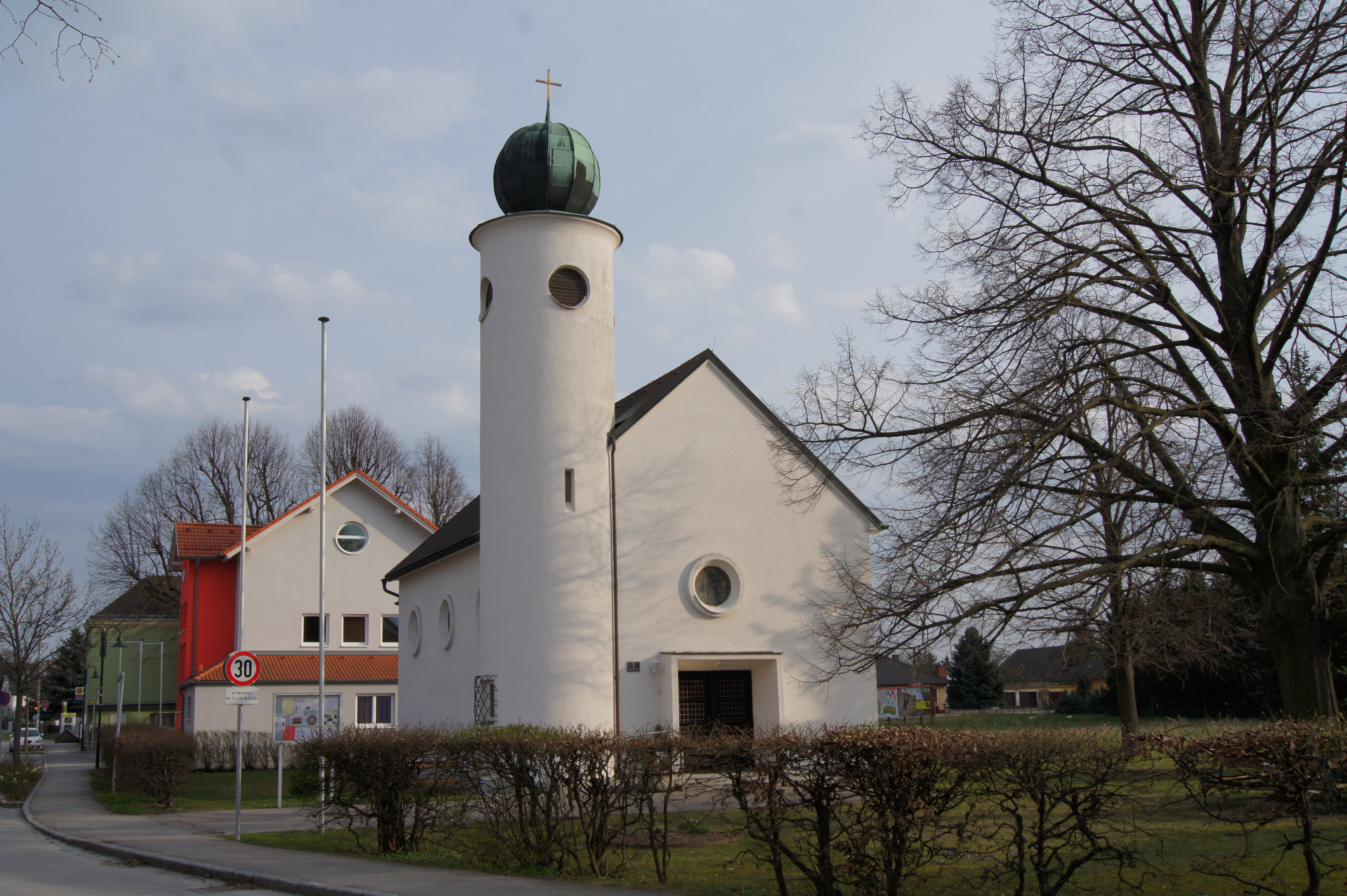 Kath. Filialkirche Zum guten Hirten